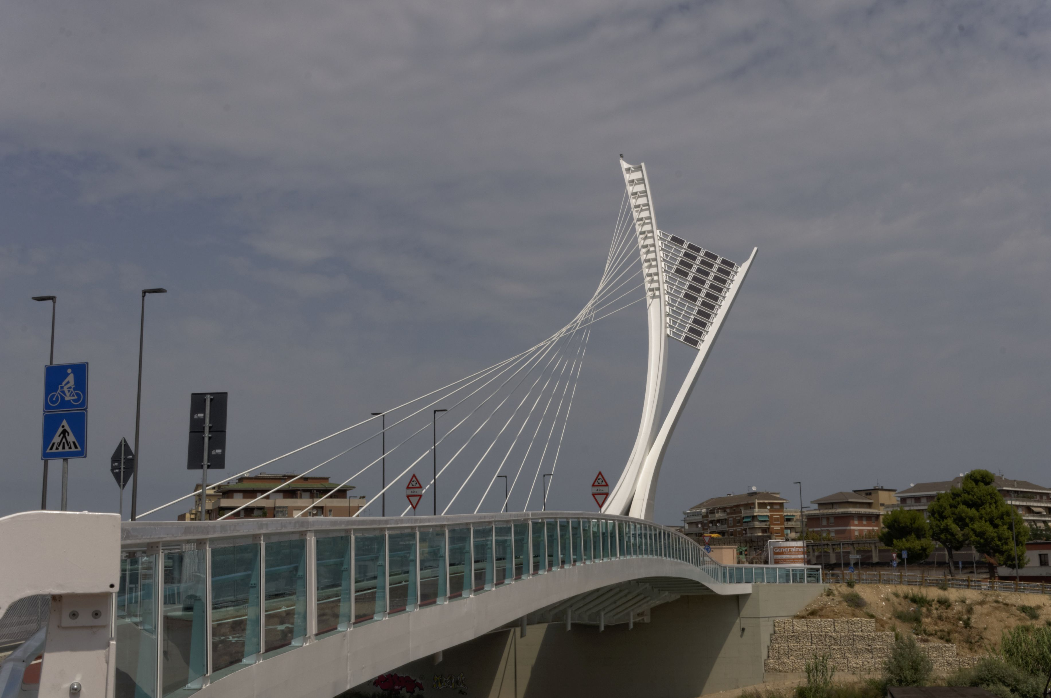 Pescara -Ponte Flaiano- 2017